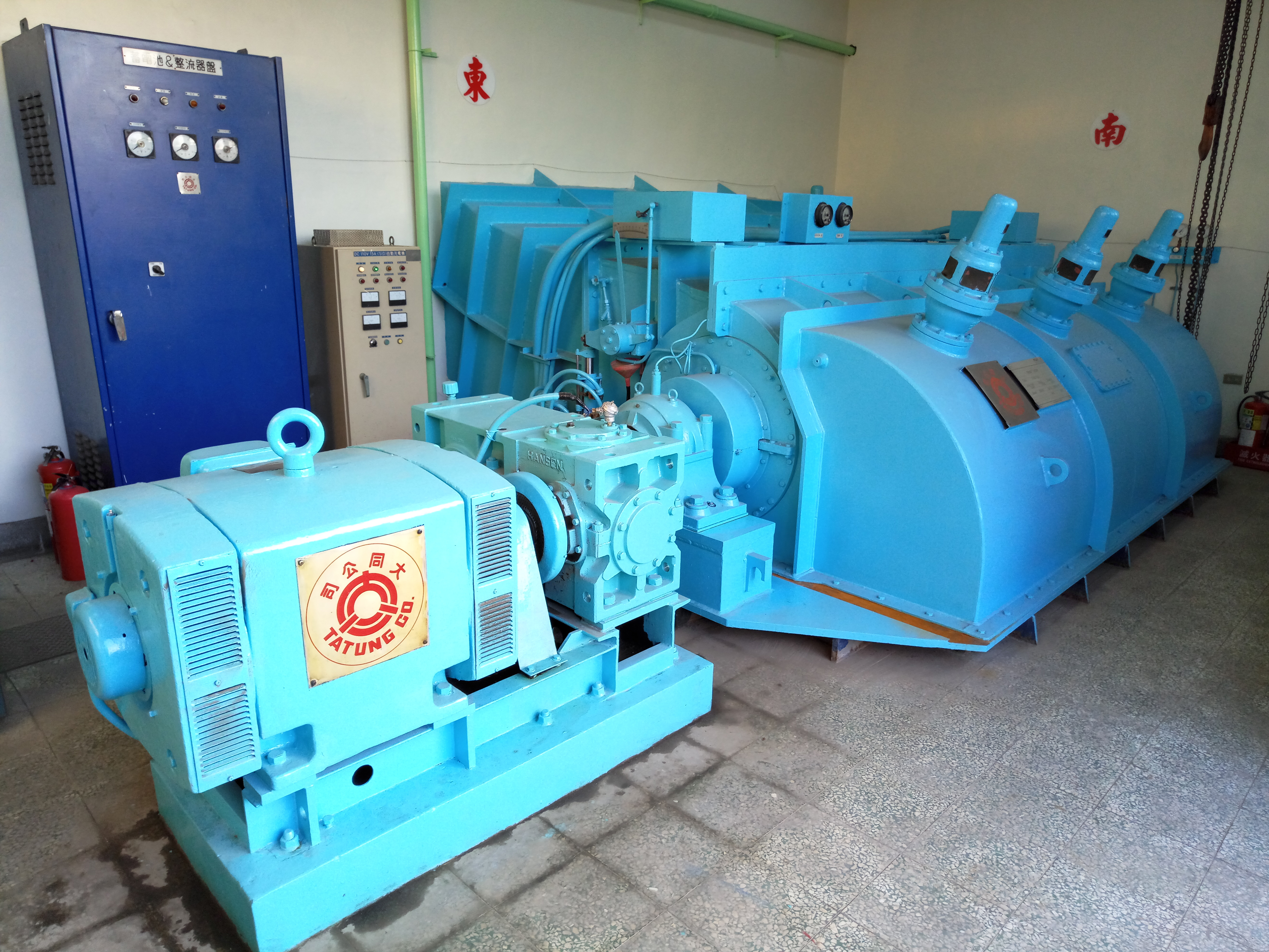 中文（台灣）: 后里圳低落差示範電廠水輪發電機組，大同公司承製。